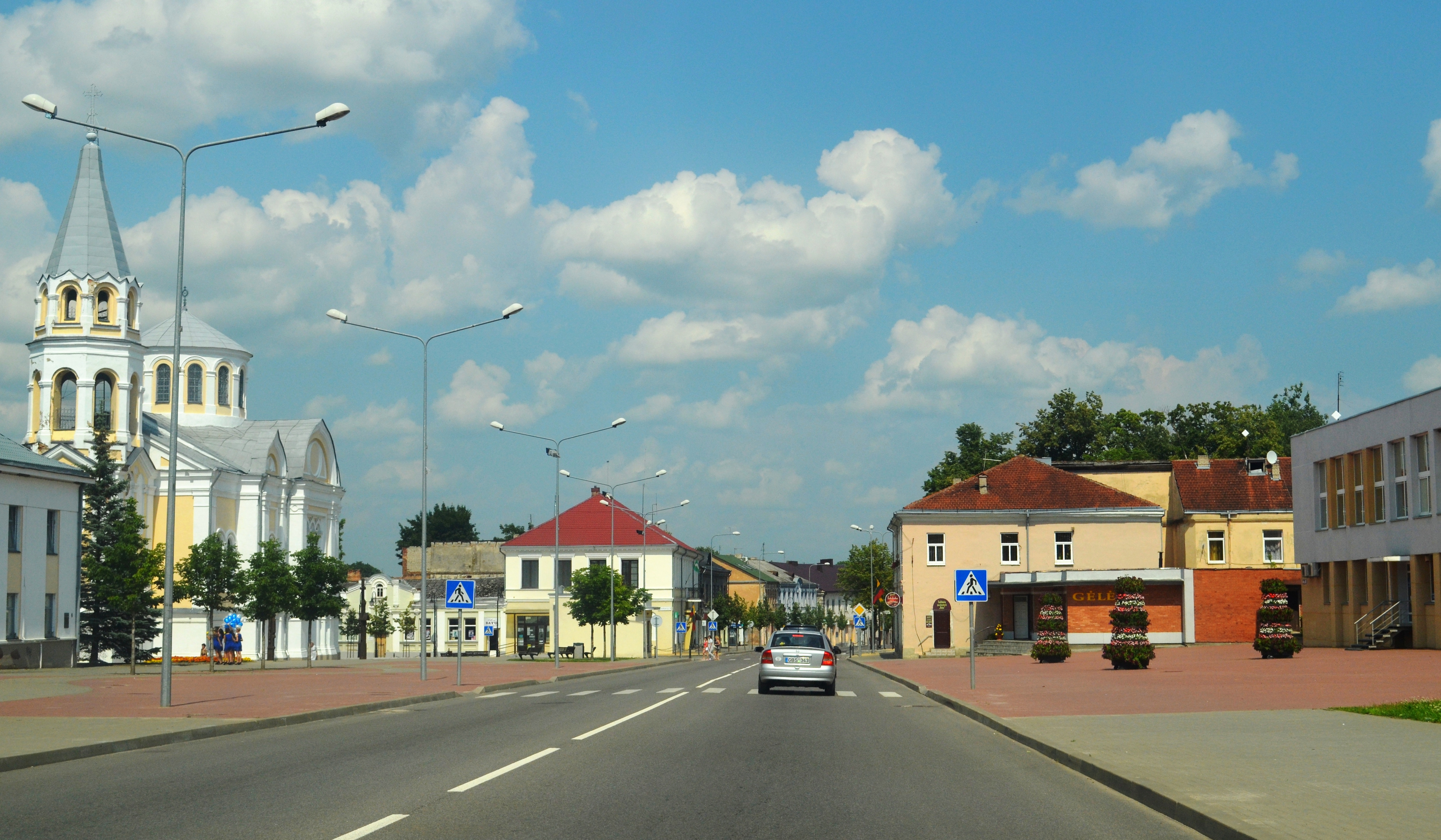 Ukmergė, miesto centras